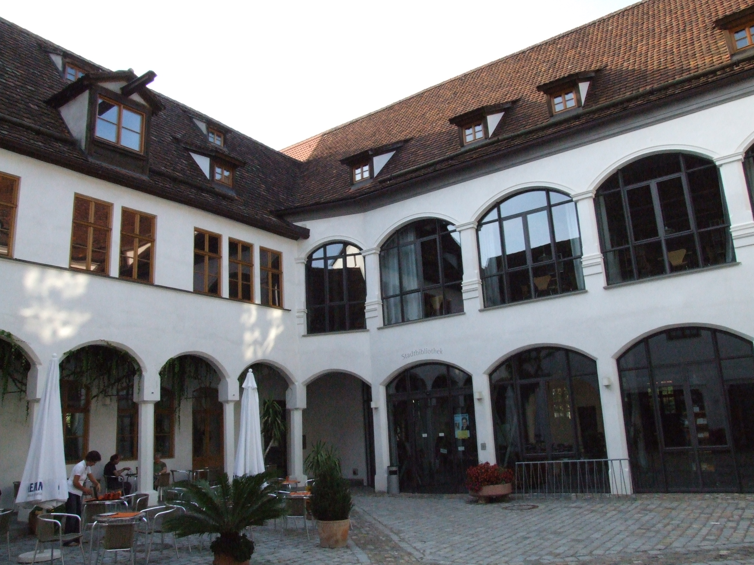 Antoniterklosterhof